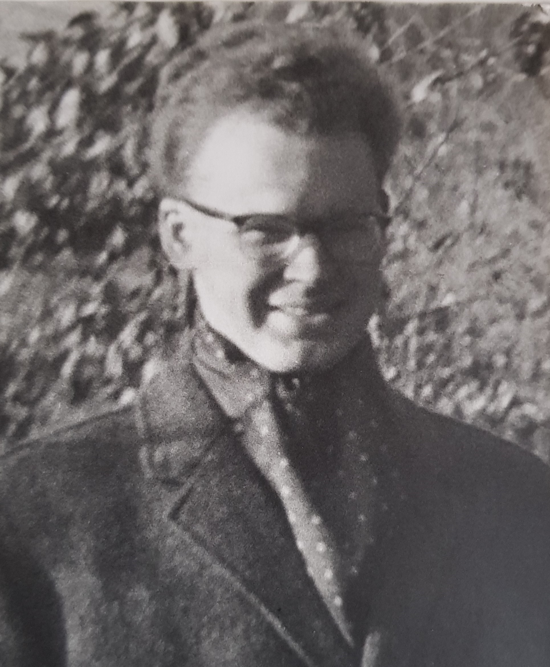 Portrait